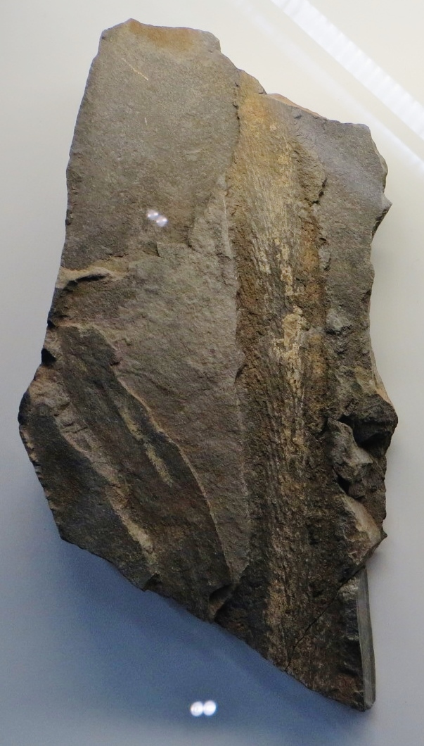 Fossil of Baragwanathia- Took the picture at Museum am Lowentor, Stuttgard